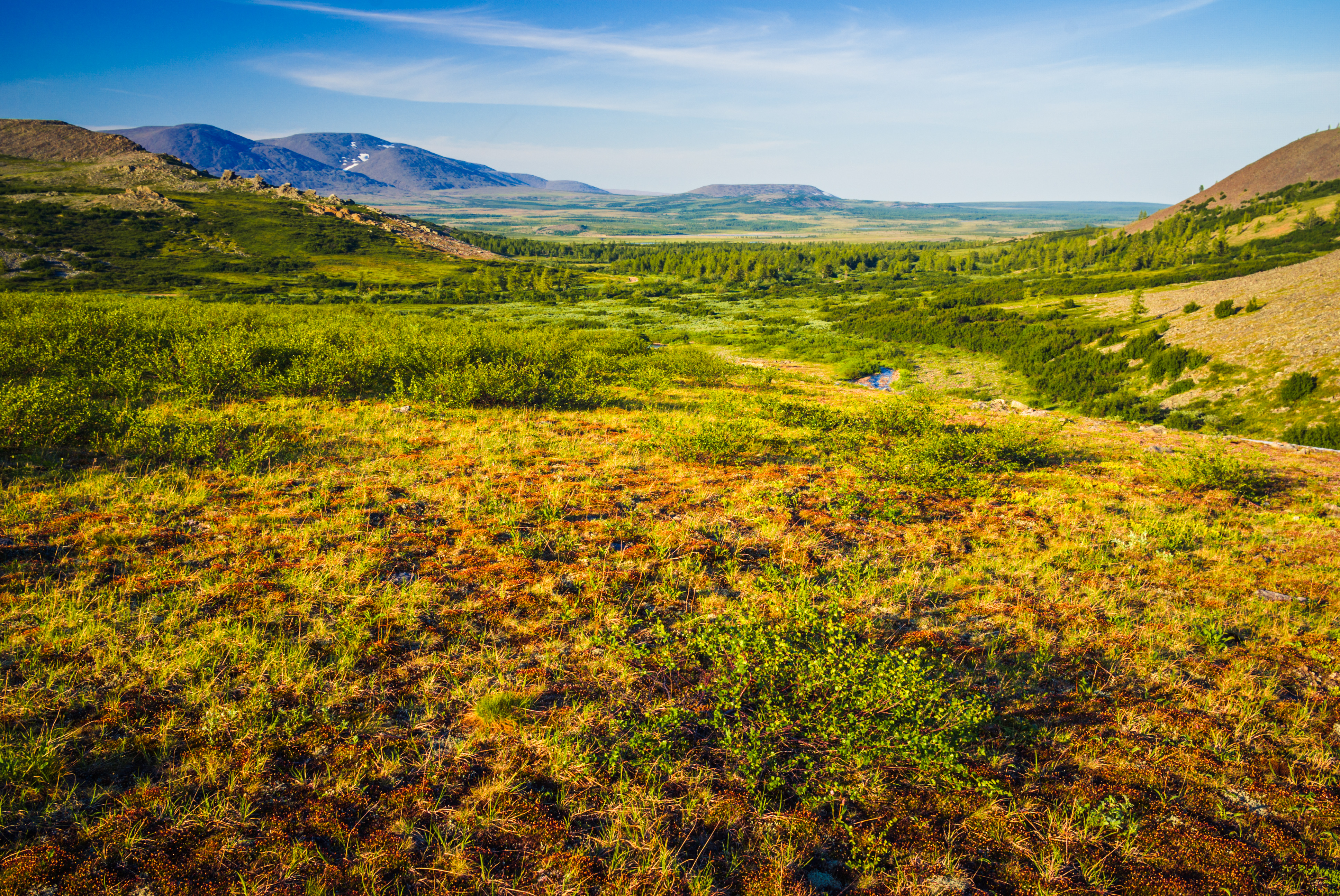 Полярно-Уральский заказник: Заказник «Полярно-Уральский» расположен в Приуральском районе Ямало-Ненецкого АО по правобережью реки Собь в предгорьях Полярного Урала примерно в 10 км от поселка и железнодорожной станции Харп,Приуральский район, This image is related to the protected area of Russia number 8910009